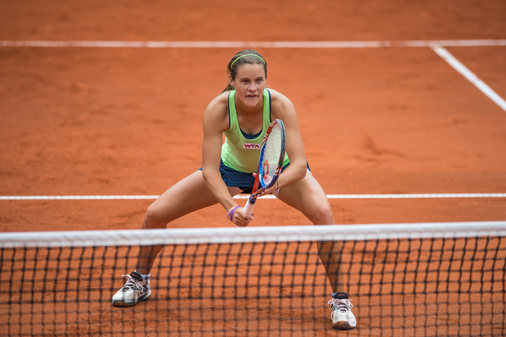 Damentennis,Natalie Ann Pluskota,Natalie Pluskota,Nürnberger Versicherungscup 2014,Tennis,WTA